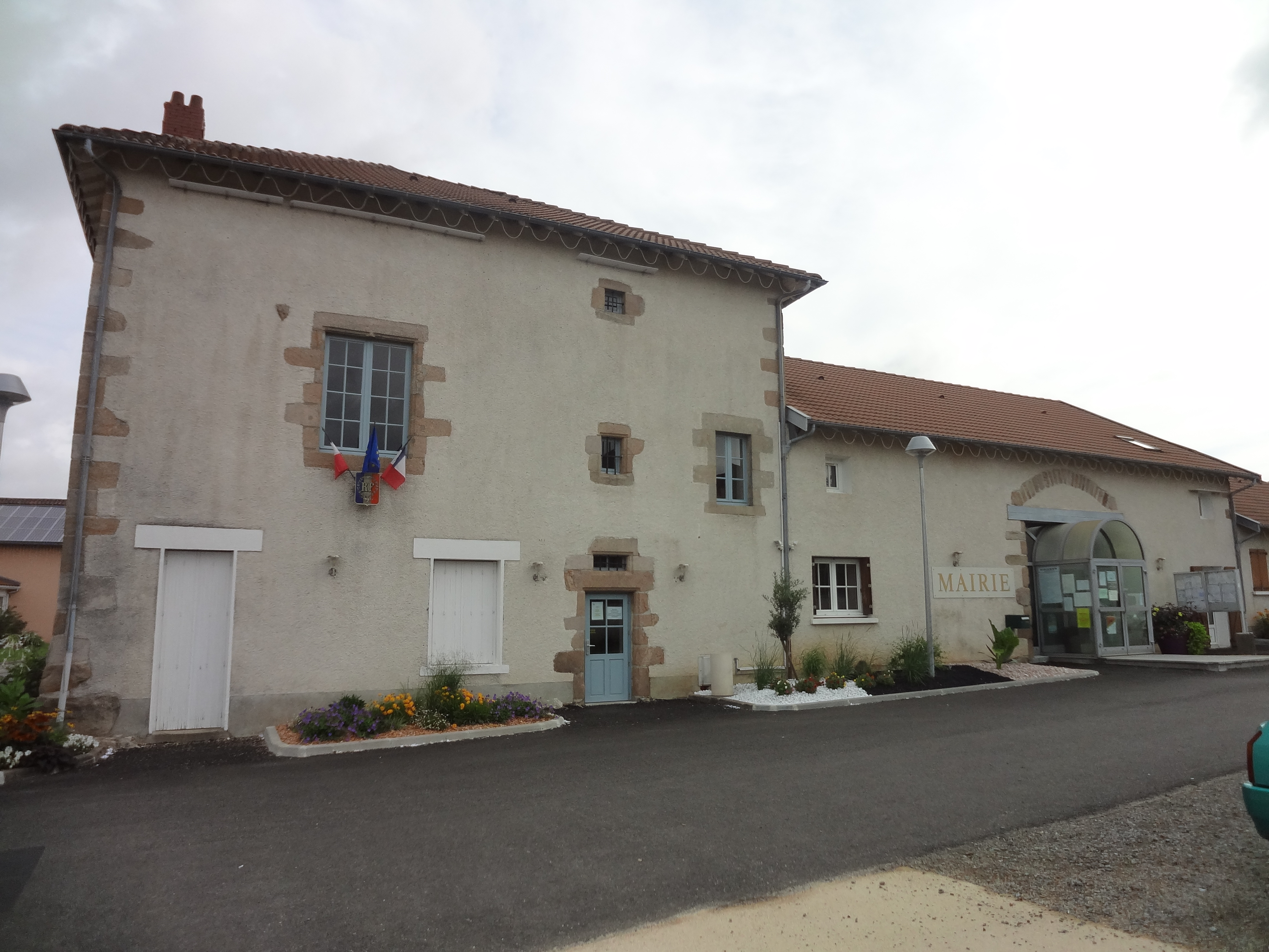 mairie